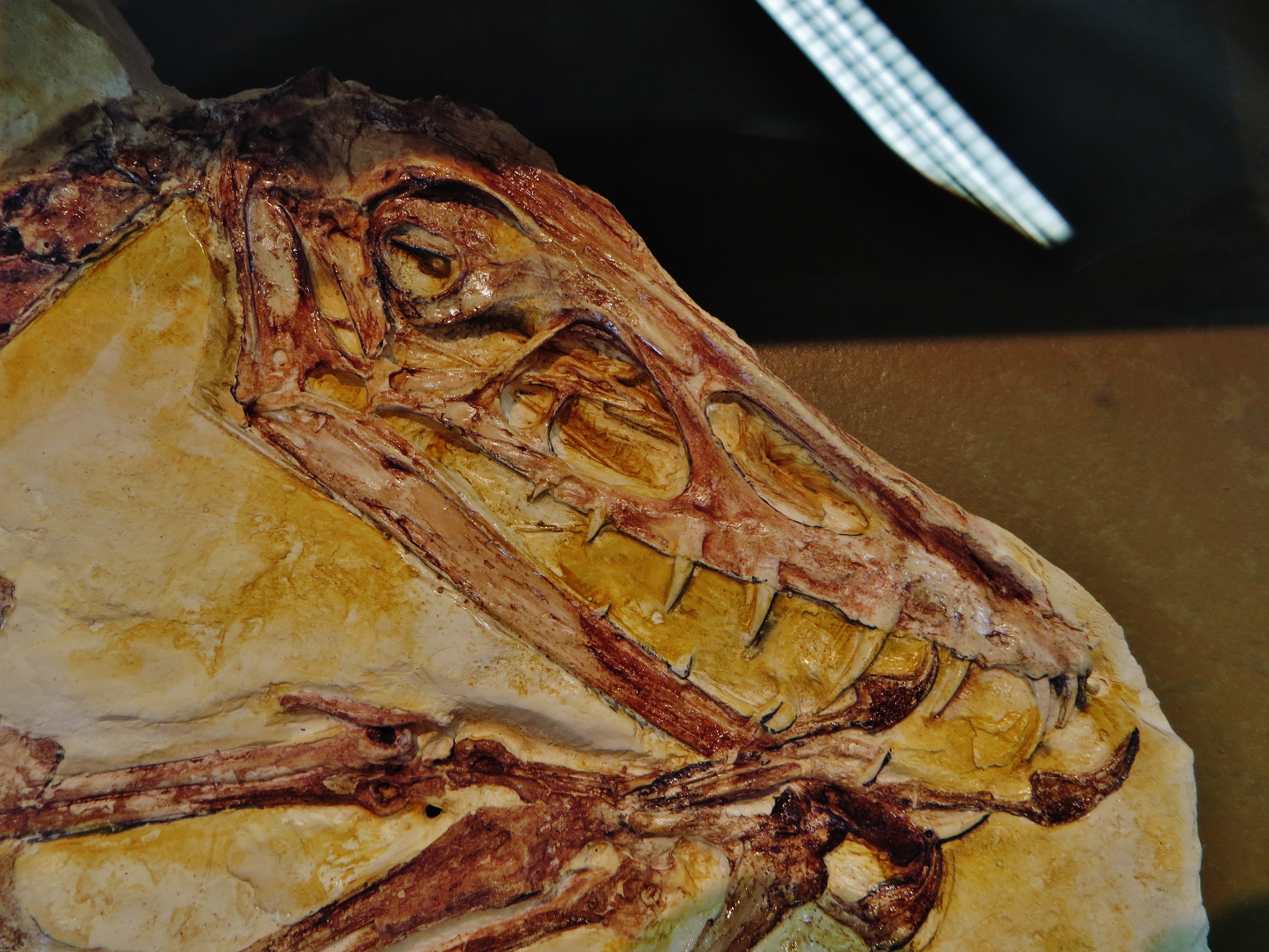 Fossil of Scaphognathus- Took the picture at Natural History Museum, Bonn University